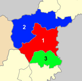 Χάρτης των ενοτήτων (και πρώην δήμων) από τις οποίες αποτελείται ο Δήμος Σουφλίου. Σουφλίου Ορφέα Τυχερού